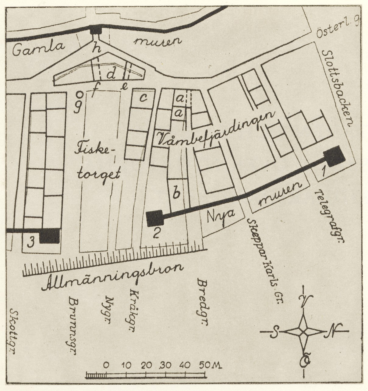 Rekonstruktion över Fisketorget och Våmgefjärdingen på 1450-talet i Gamla stan, Stockholm